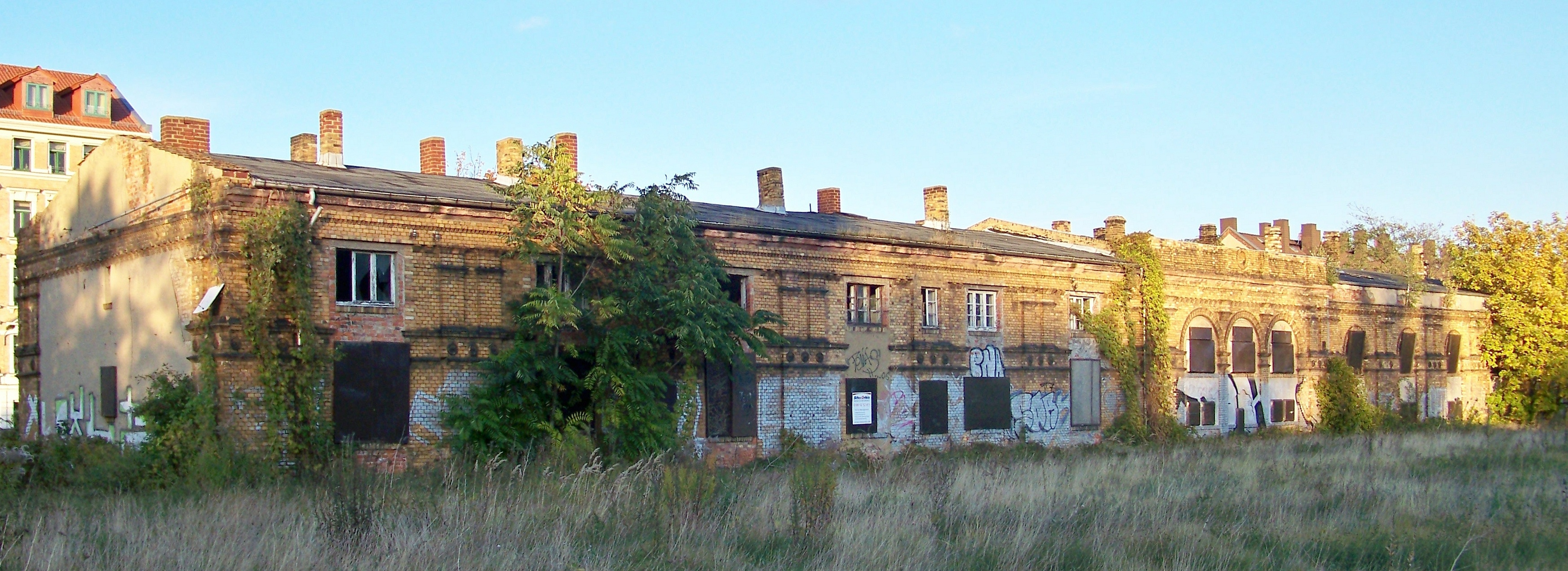 Güterabfertigungsgebäude des ehemaligen Eilenburger Bahnhofes in Leipzig-Reudnitz, Eilenburger Straße, Lene Voigt Park.